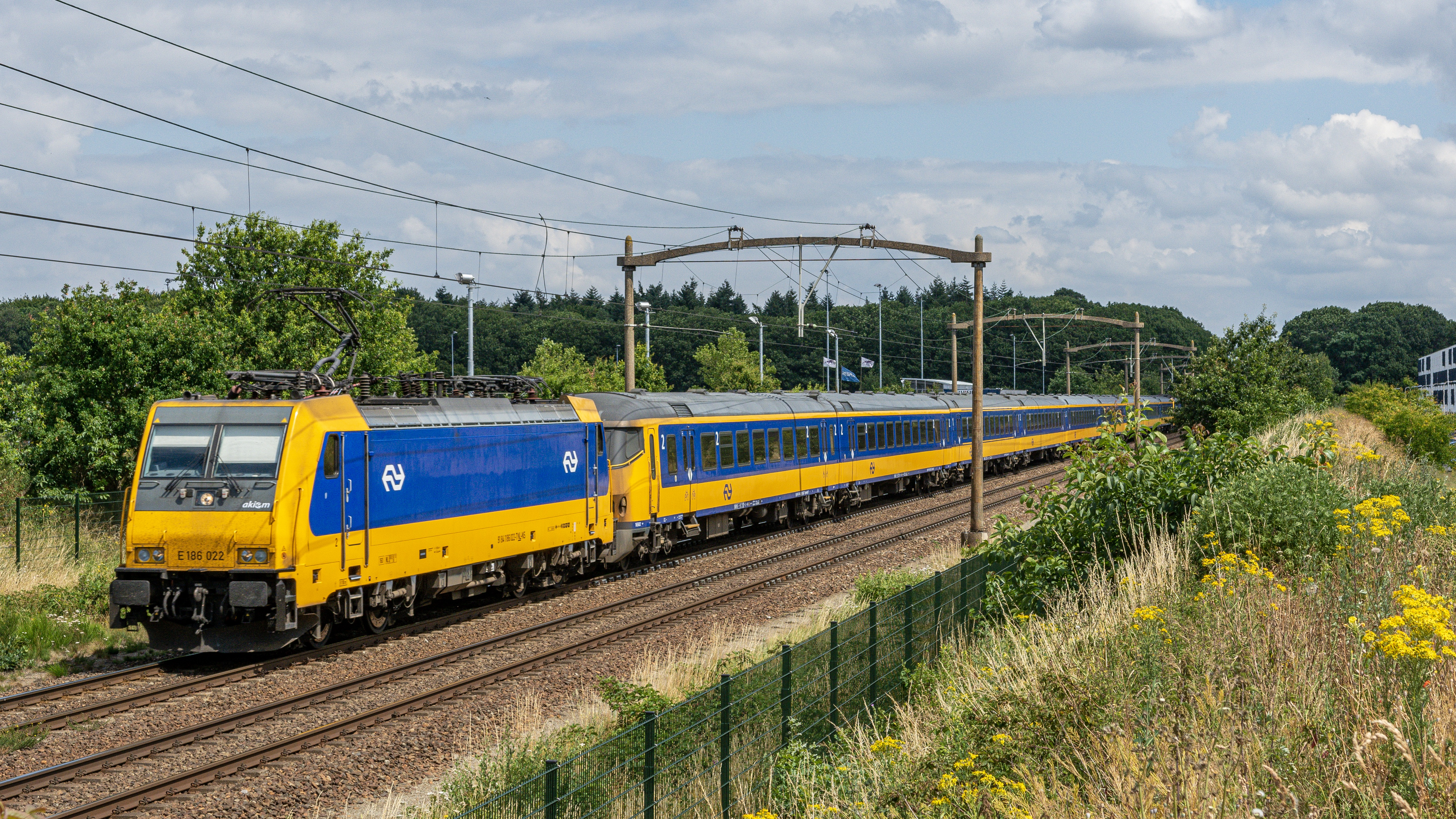 Vlak voor station Tilburg Reeshof rijdt NSR 186 022-117 met IC-Direct 1150 naar Den Haag Centraal.